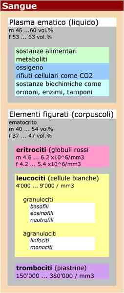 Grafica: Medicina: Fisiologia, Anatomia: Ematologia: composizione, sangue, plasma, elementi figurati, ematocrito, eritrociti, globuli rossi, leucociti, globuli, cellule, bianche, granulociti, agranulociti, trombociti, piastrine, medicina popolare, complementare, laica, non convenzionale